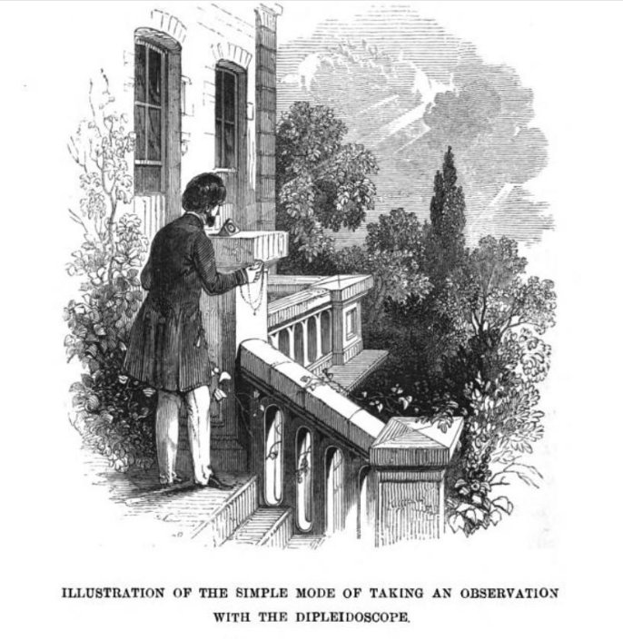 Dipleidoscopio de Edward John Dent (1790–1853) Imagen de su obra: Título A Description of the Dipleidoscope, Or Double-reflecting Meridian and Altitude Instrument: With Plain Instructions for the Method of Using it in the Correction of Time-keepers, Volumen 7 A Description of the Dipleidoscope, Or Double-reflecting Meridian and Altitude Instrument: With Plain Instructions for the Method of Using it in the Correction of Time-keepers, Edward John Dent Autor Edward John Dent Edición 8 Publicado en 1867 Procedencia del original Universidad de Oxford Digitalizado 6 Ene 2009 N.º de páginas 29 páginas